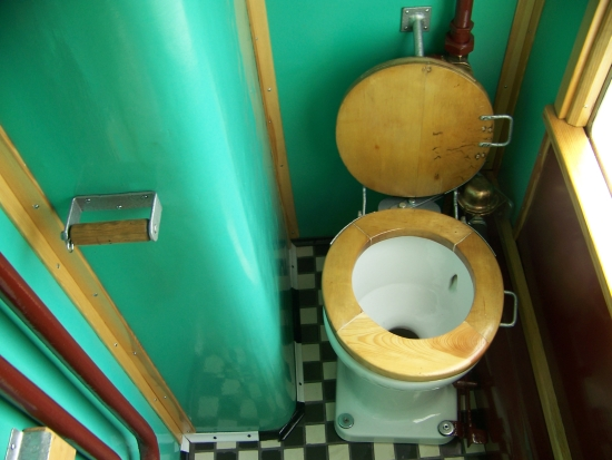 Zrekonstruowany przedział ustępowy wagonu 1Aw. Kolej Wąskotorowa Rogów - Rawa - Biała